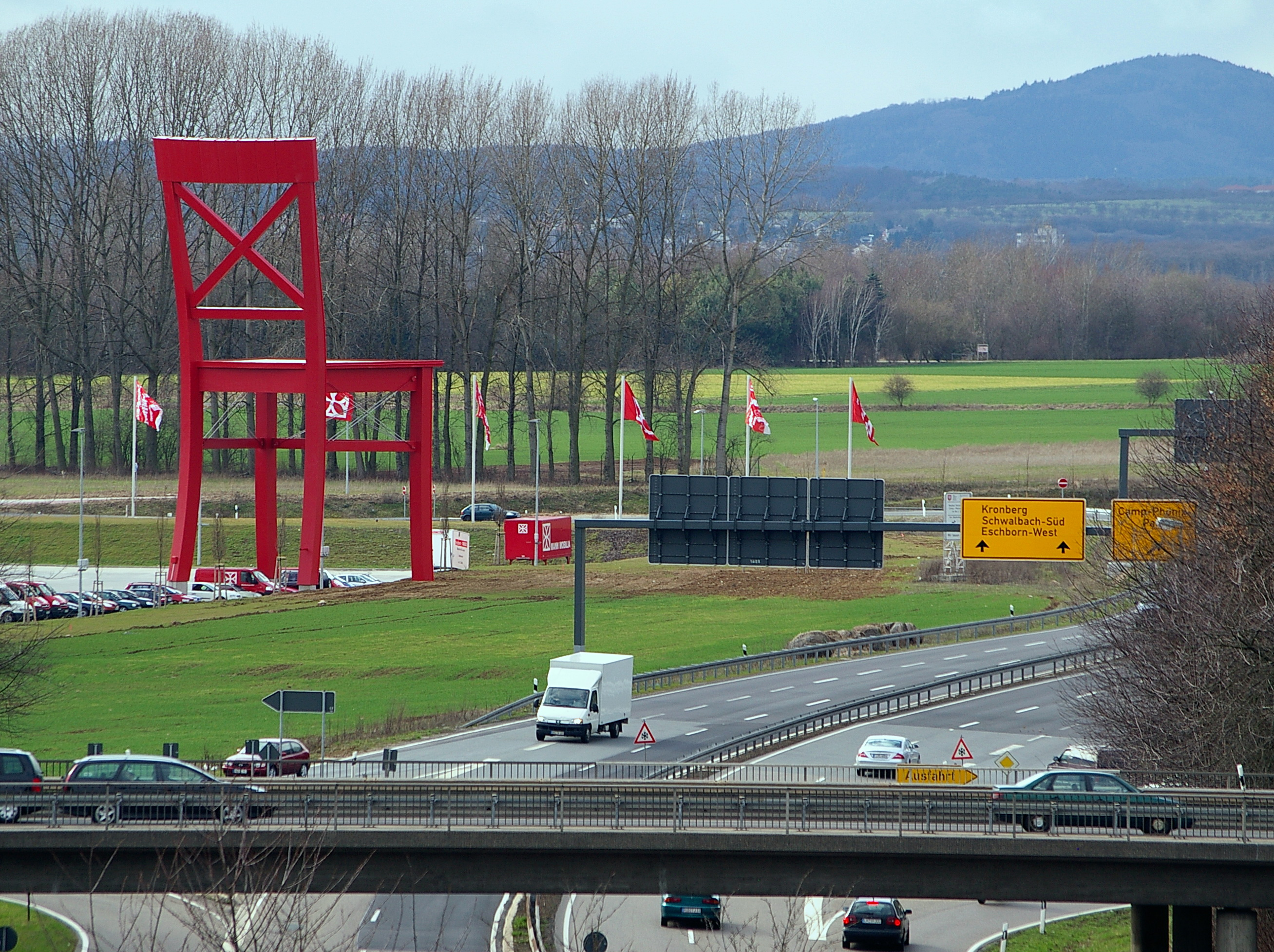 Holzstuhl in Eschborn, 25 m hoch. Im Vordergrund die Umgehungsstraße L3005, querend eine Brücke der L3006 (Sossenheimer Straße), im Hintergrund der Große Feldberg des Taunus.